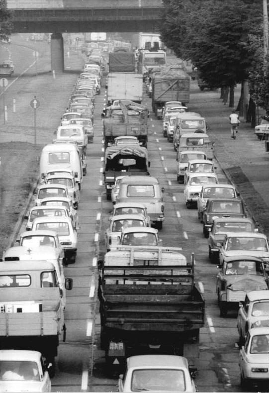 ADN-ZB-Oberst- 10.8.88-mx-Berlin: Parken + Reisen- Soweit das Auge sehen kann: Autos. Unzählige aus dem Süden kommende Berlinbesucher fahren stündlich über das Adlergestell in Richtung Stadtzentrum. Solche Staus, verbunden mit großem Zeit- und Kostenaufwand, sind die Folge. Der P+R-Parkplatz an der Autobahnabfahrt dagegen bleibt leer. Dabei erreicht man das Zentrum von Altglienicke aus mit der S-Bahn in nur 25 Minuten. (siehe auch 27N)